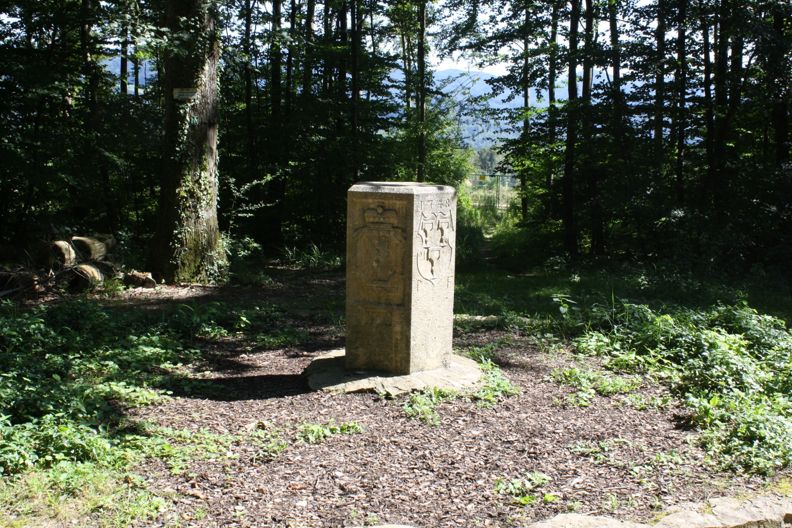 Hohbannstein südlich Freiburg im Breisgau, beim Hohfirst auf dem Schönberg